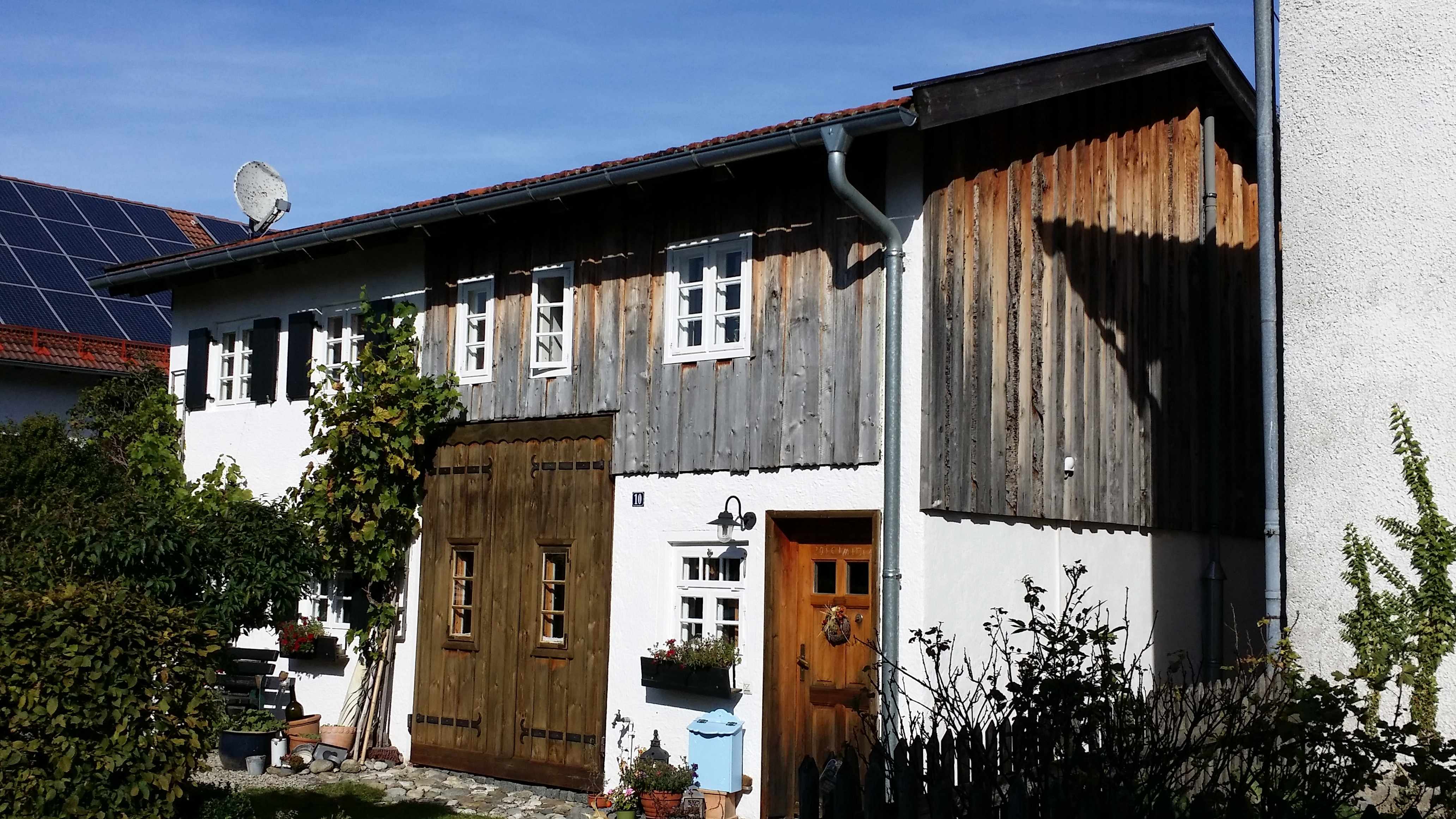 Mittertennbau mit Flachsatteldach, 2. Hälfte 18. Jahrhundert